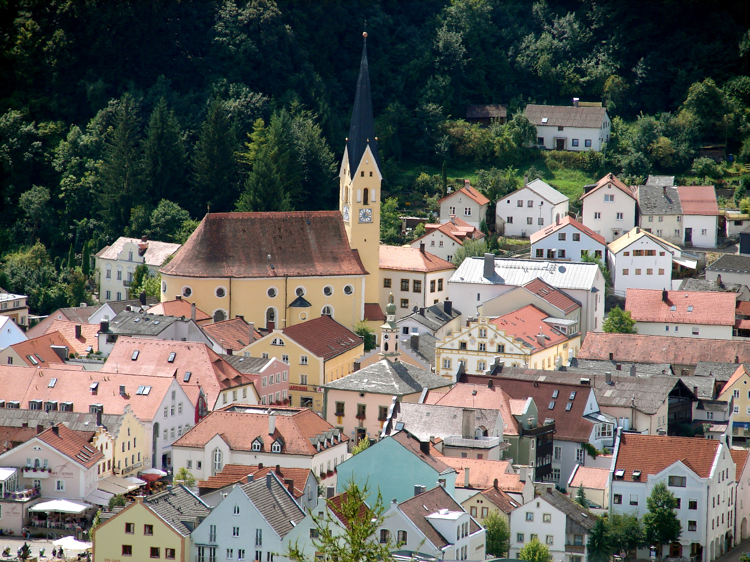 St. Johann Baptist ist die katholische Stadtpfarrkirche von Riedenburg. Die Kirche liegt in der Altstadt, unterhalb der Rosenburg. Zur Pfarrgemeinde gehört auch die St.-Anna-Kirche.